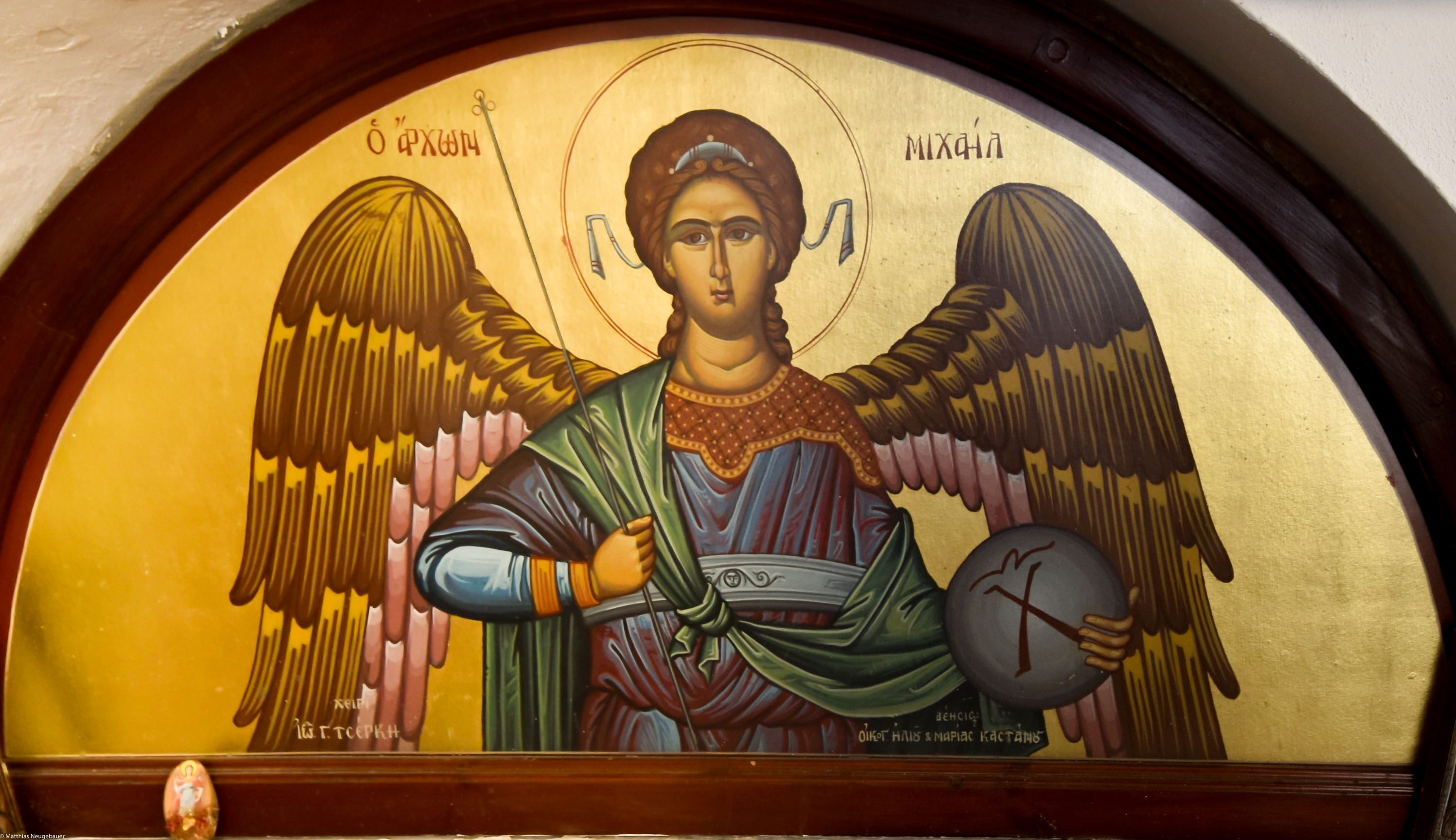 Darstellung des Heiligens Erzengels Michael im Kloster Panormtis auf der insel Symi